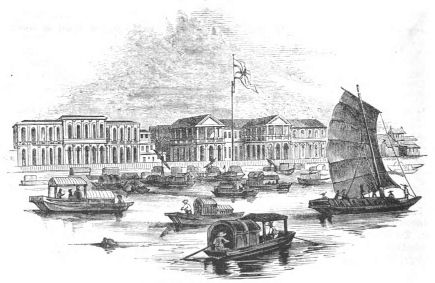 Englische Factoreien in Canton.